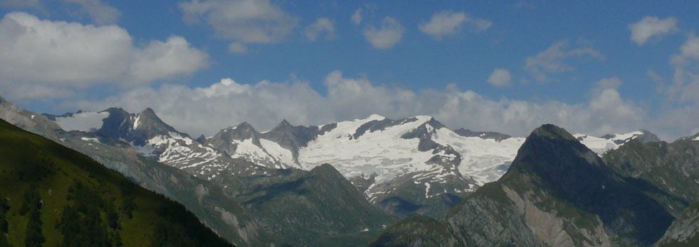 Blick in einen Teil der westliche Venedigergruppe von Südosten aus (Muhsweg). V.l.n.r. Malhamspitzen, Gubachspitzen, in der Bildmitte die gletscherbedeckten Simonyspitzen (3.481 m bzw. 3.488 m), rechts anschließend die Maurer Keesköpfe (teilweise verdeckt).